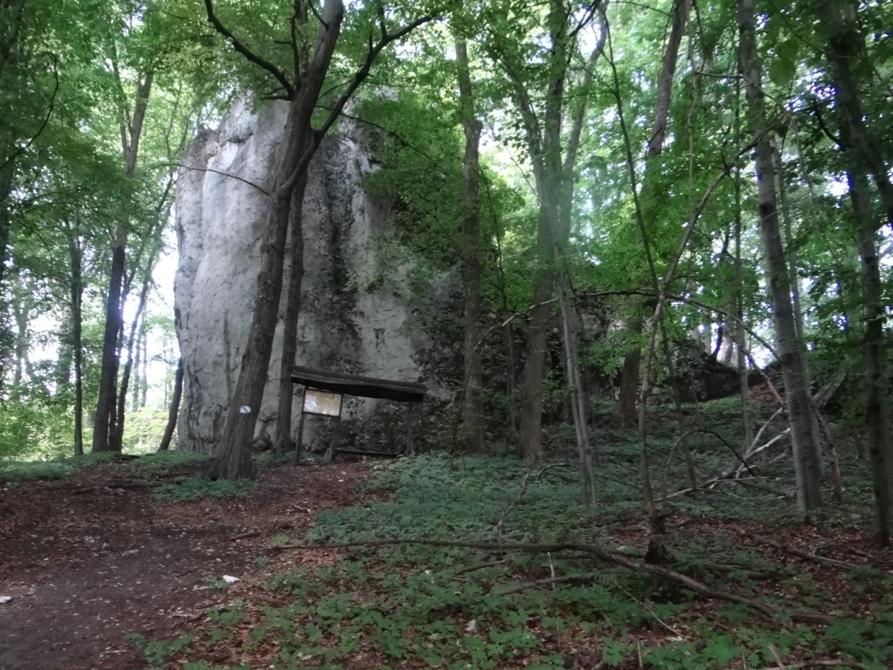 Maniakówka